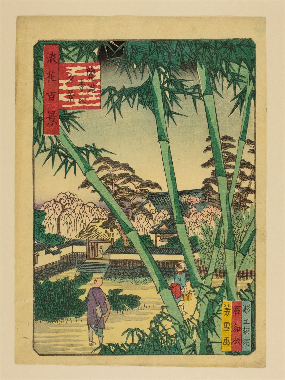 1800年代。南粋亭芳雪/画。浪花百景 102枚のうちの1枚。大阪市立中央図書館蔵。